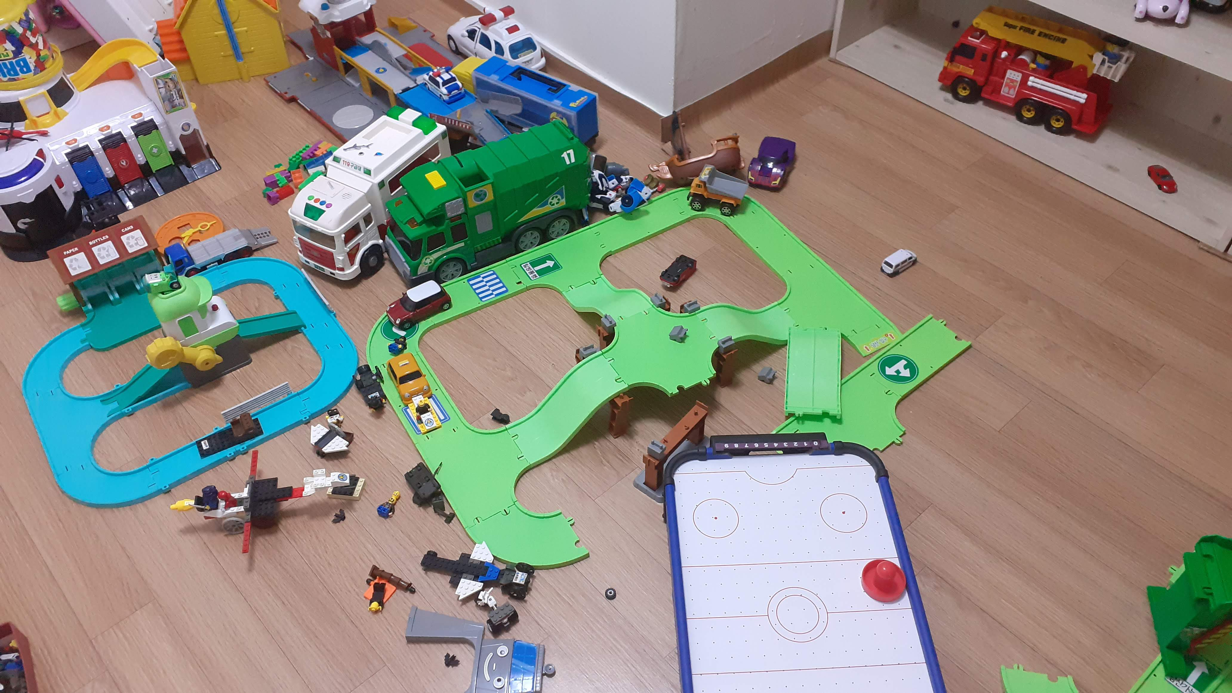 놀이치료 천안시 원성동 충절로 107, 아이사랑심리상담센터 놀이치료 장면 연출사진